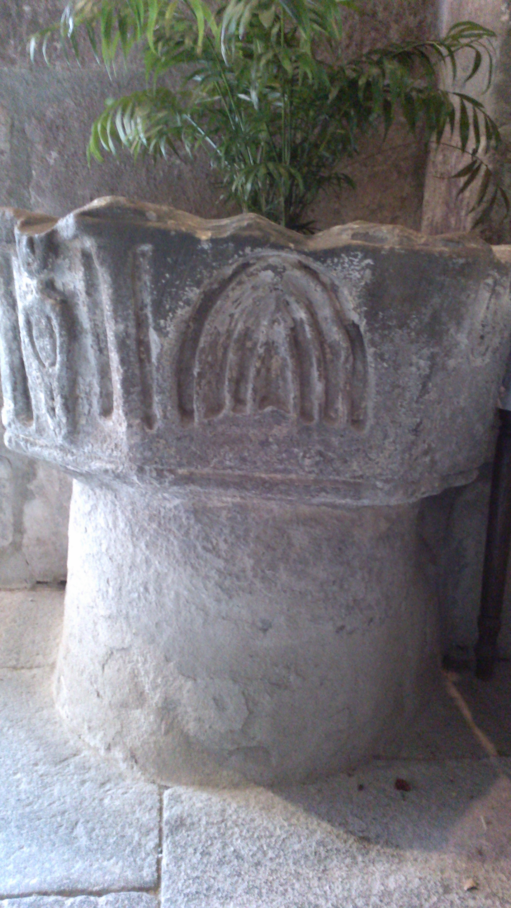 Bessay église st martin benitier provenant de l'ancienne église de Neuglise